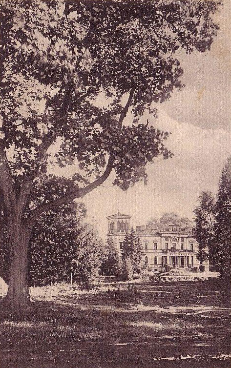 Беларуская (тарашкевіца): Лынтупы (Łyntupy), сядзіба Бішэўскіх (Bišeŭski)